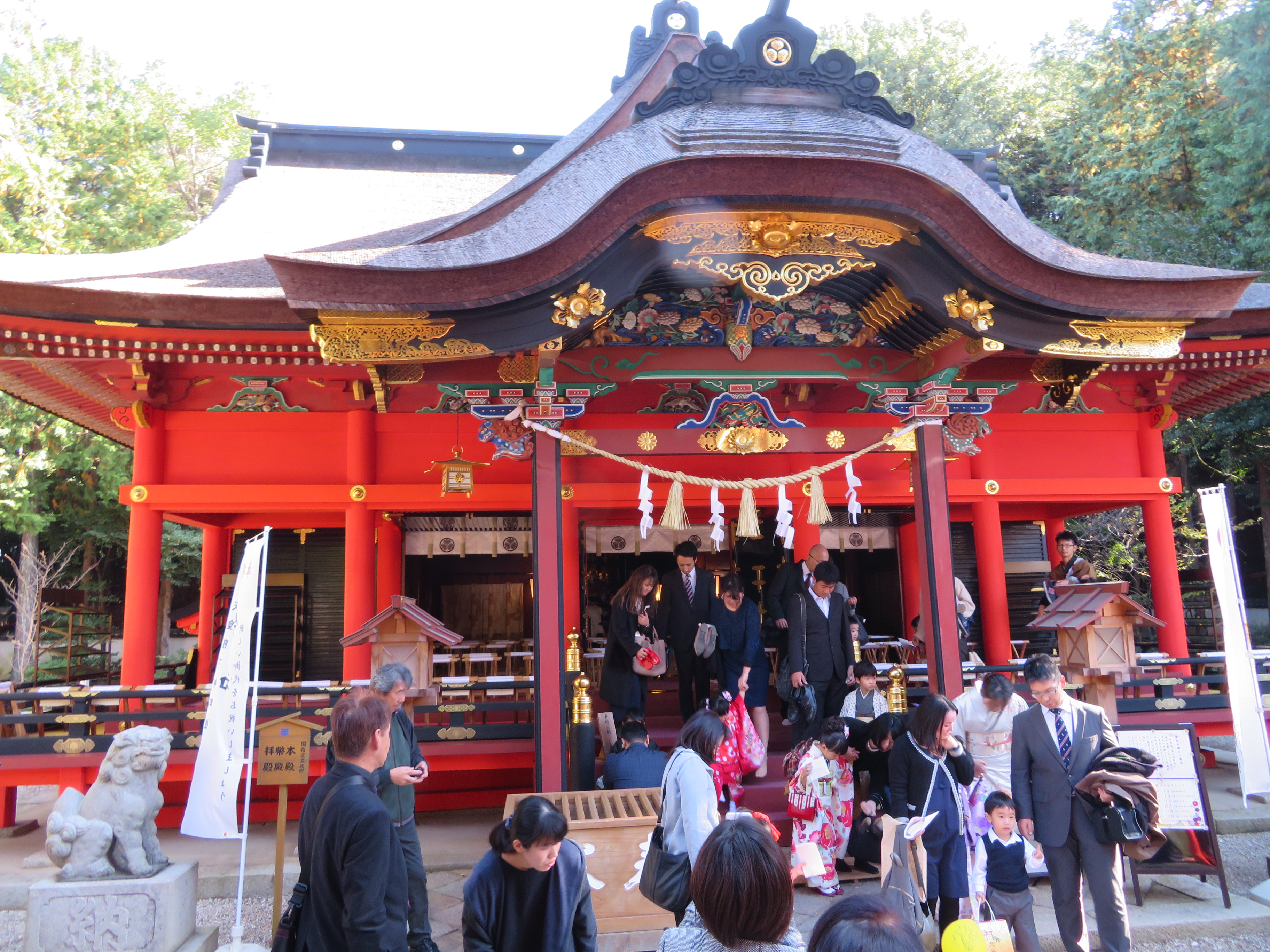 六所神社、拝殿（岡崎市明大寺町）